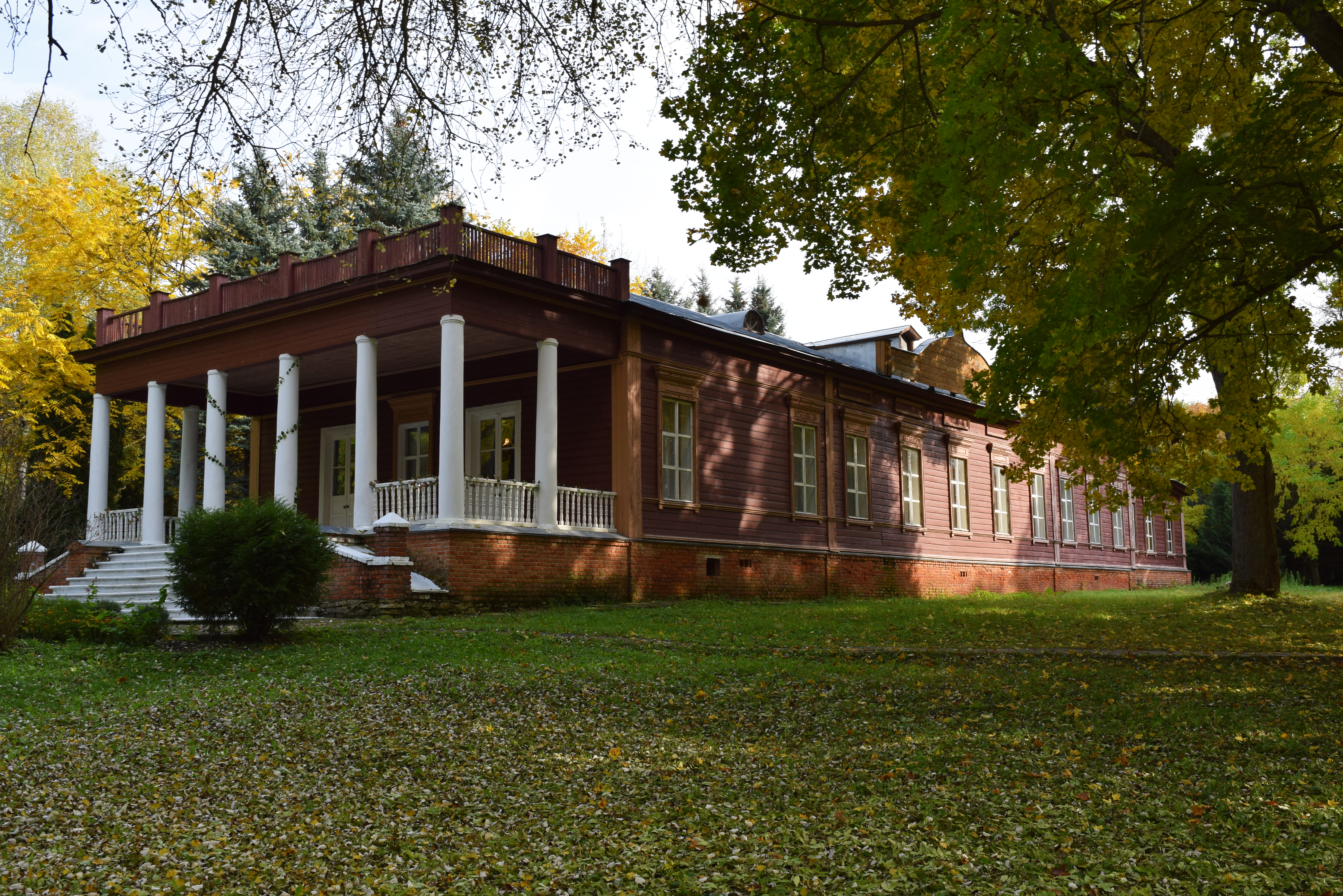 деревня Рязанка Чаплыгинского района Липецкой области